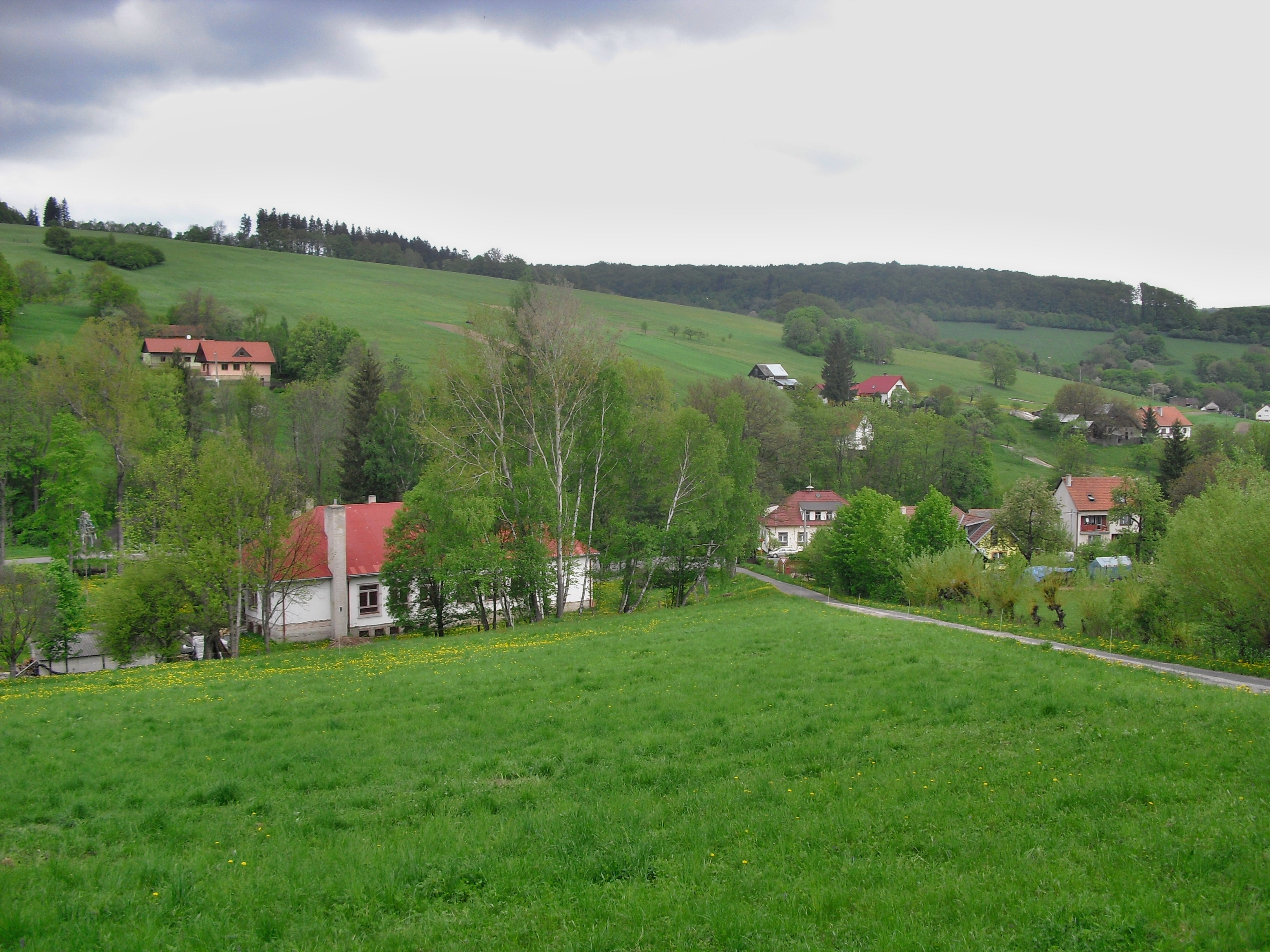 Vápenice, okres Uherské Hradiště